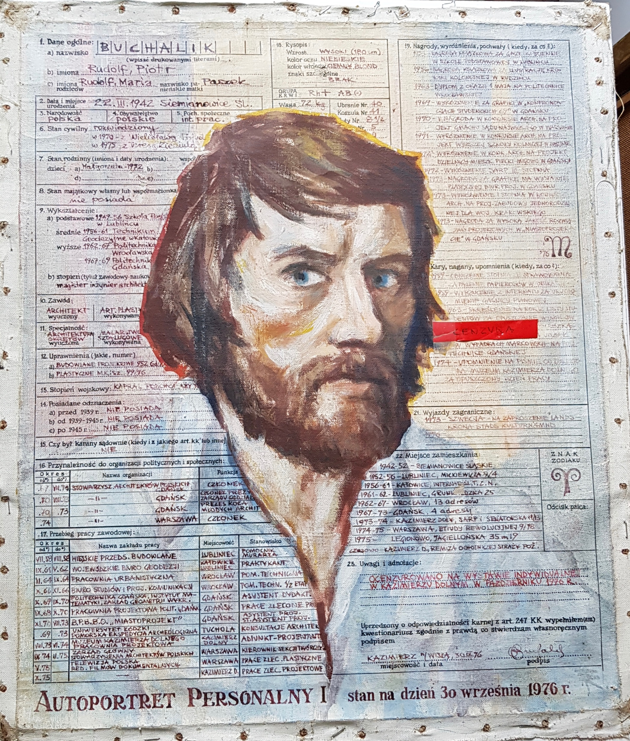 Autoportret Personalny Rudolfa Buchalika z roku 1976